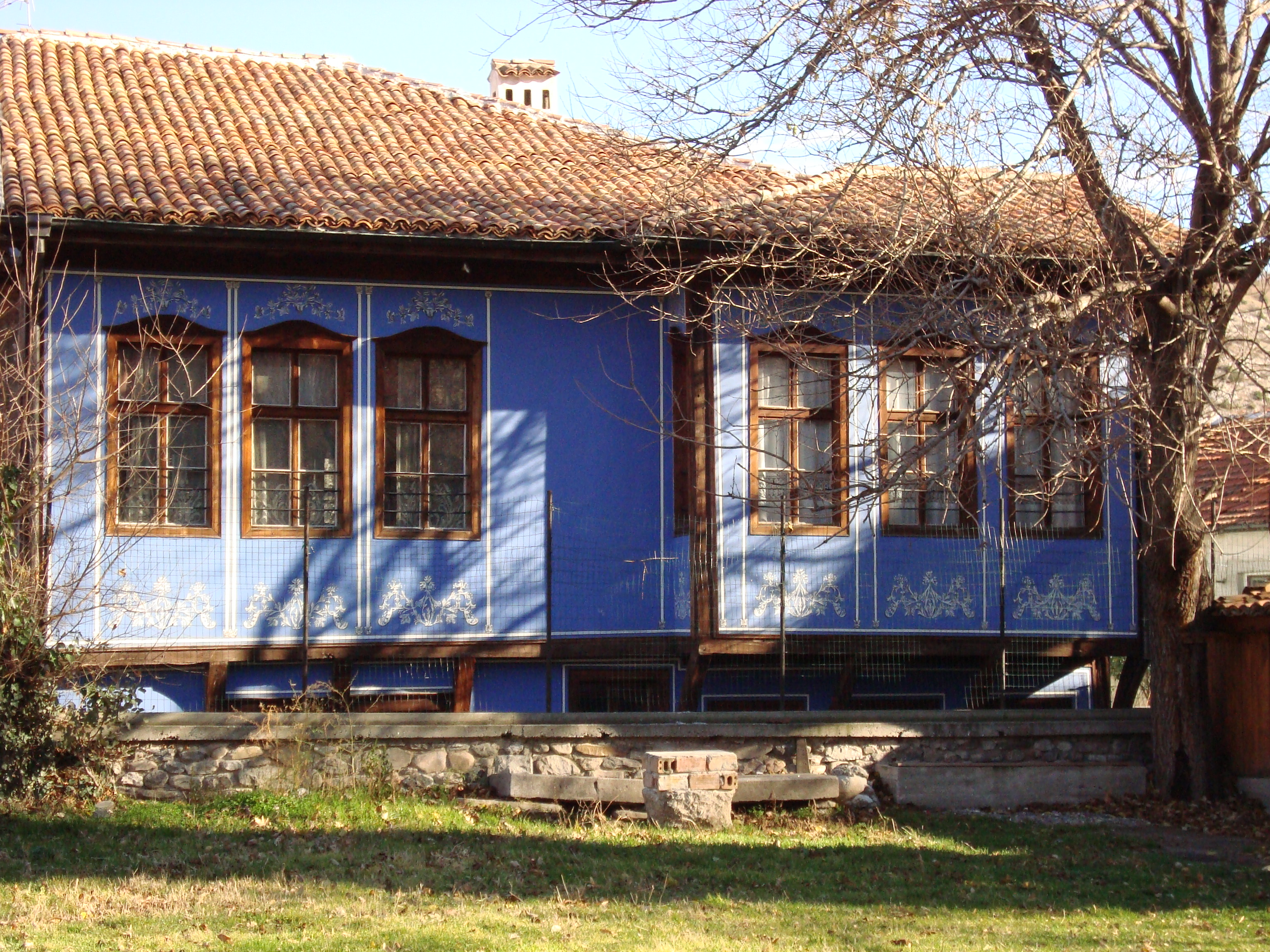 Етнографски музей, Асеновград